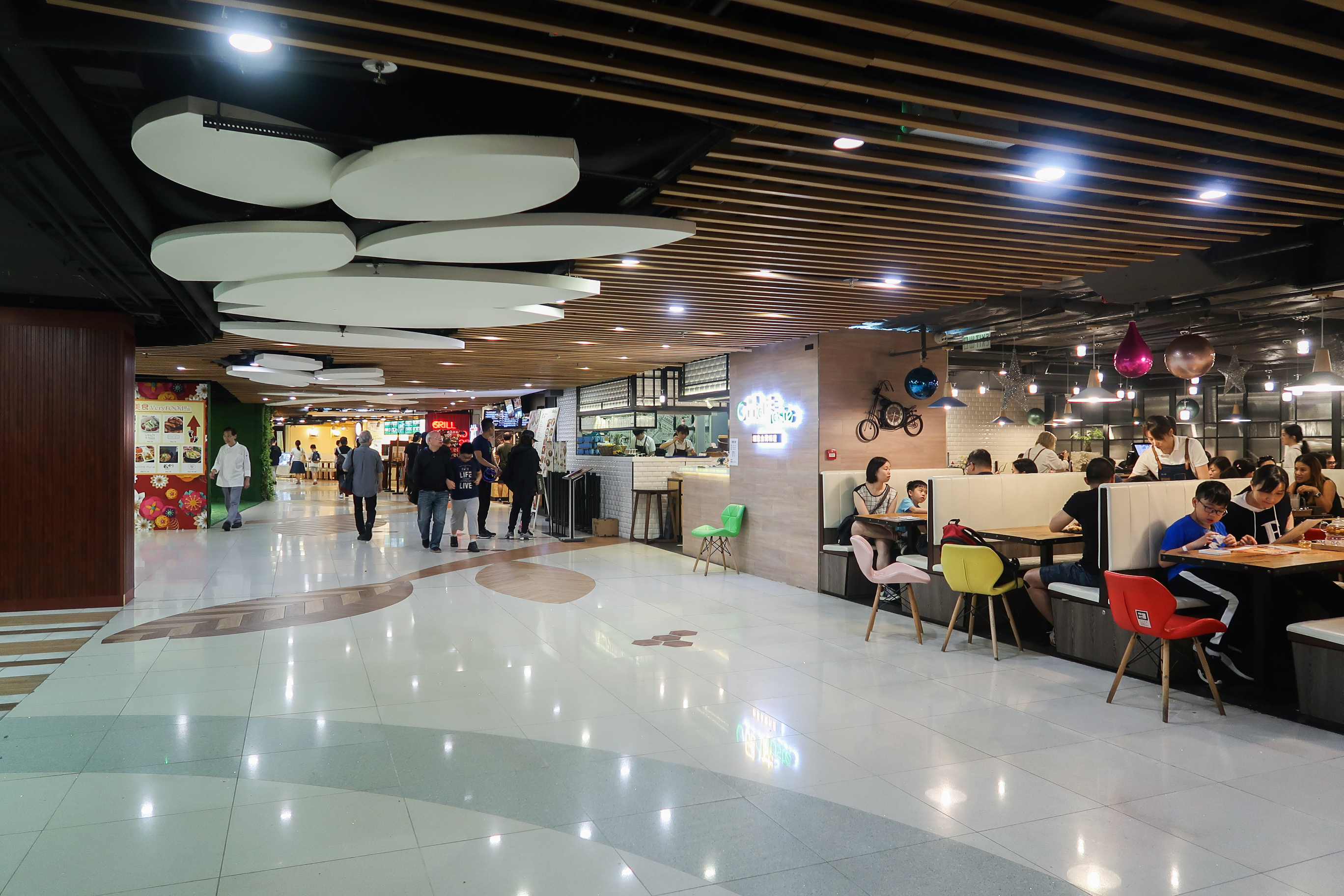 EMax Level 2 Restaurants